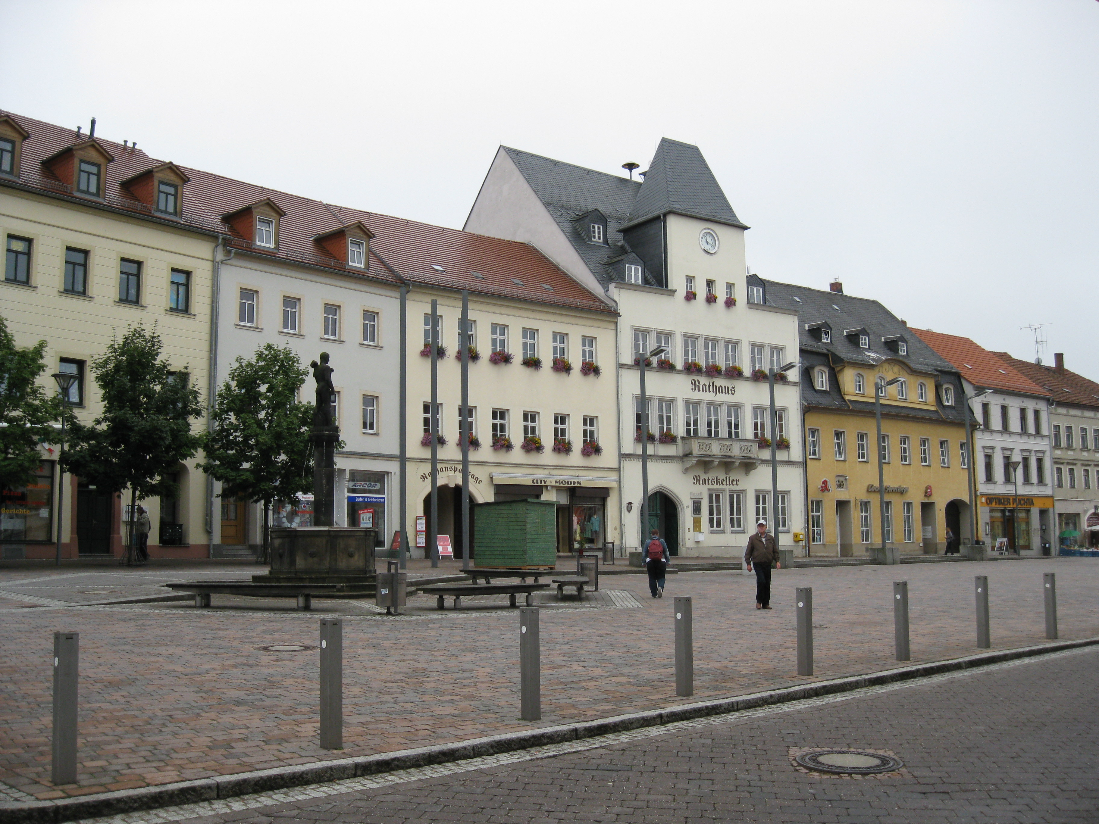 Kaiser-Ludwig-Säule in Puch, near Munich